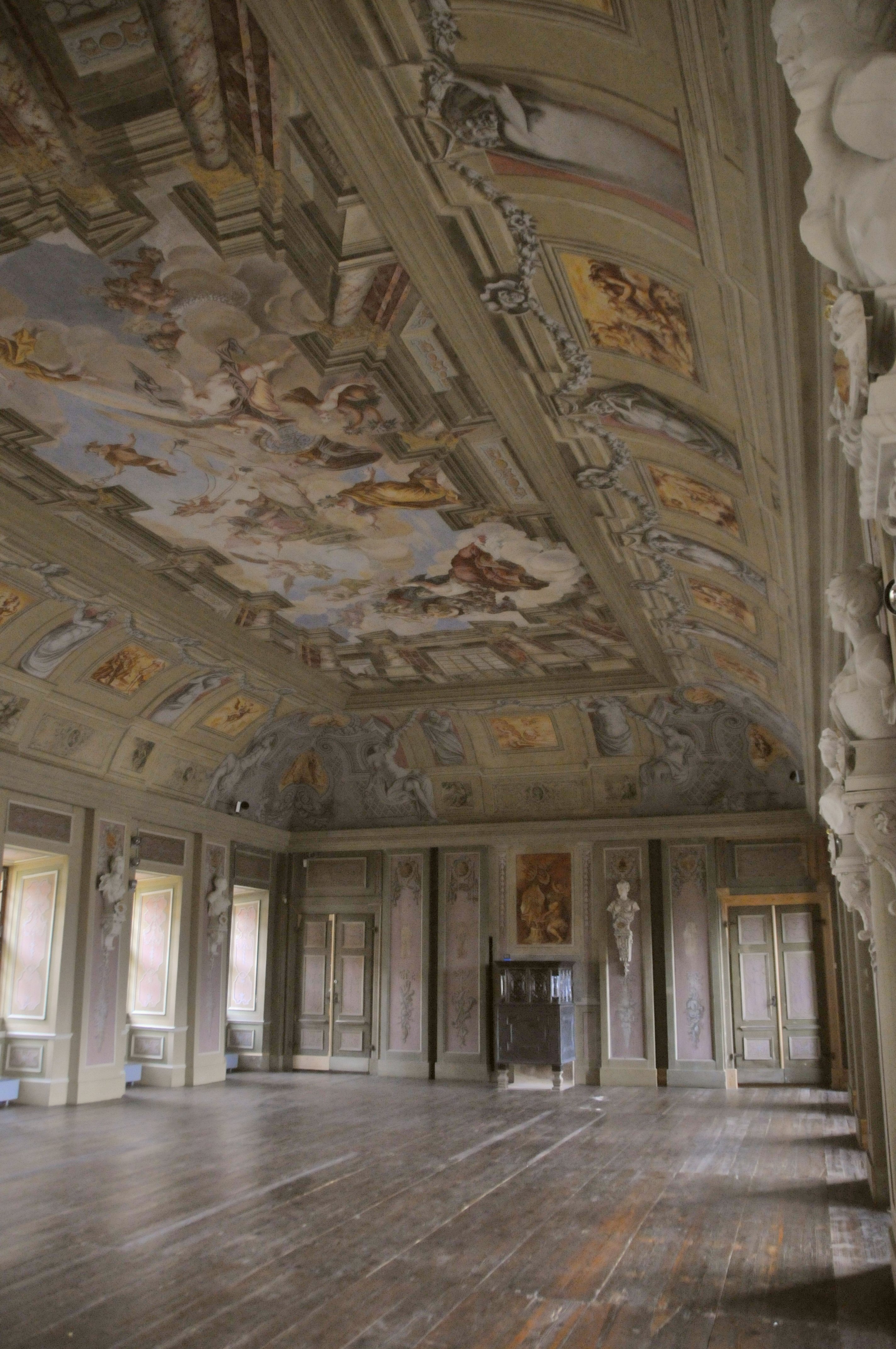 Schloss Tenneberg, Saal